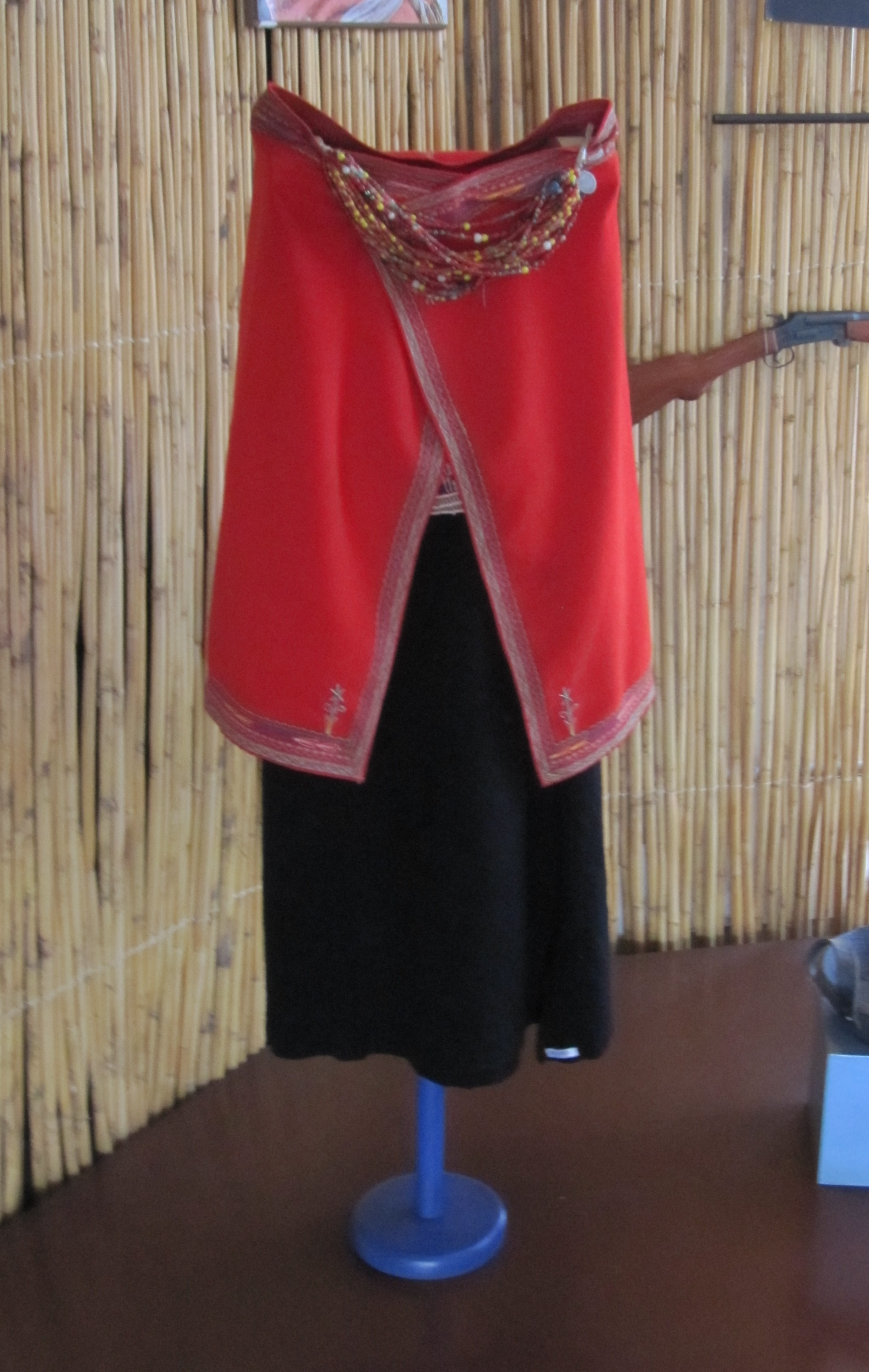 Chimbo dress